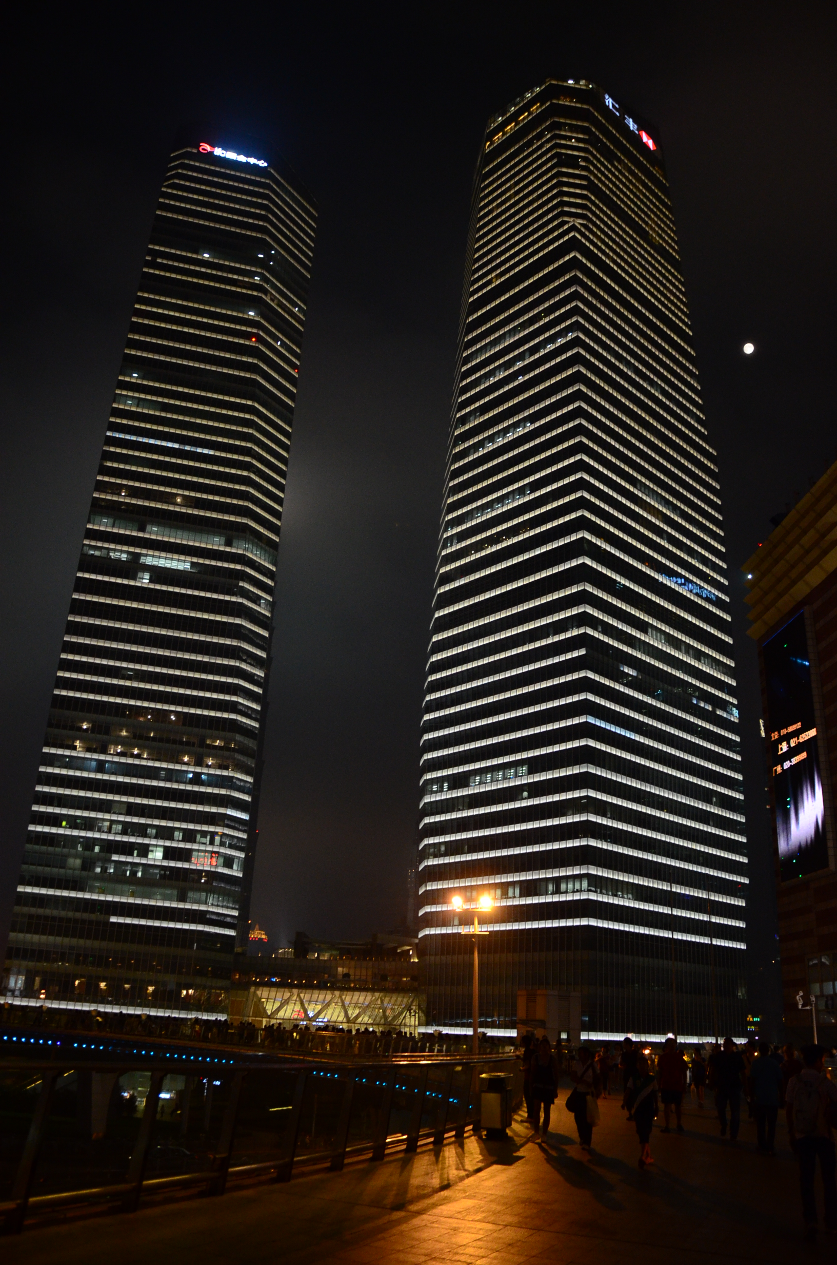 上海國金中心夜景